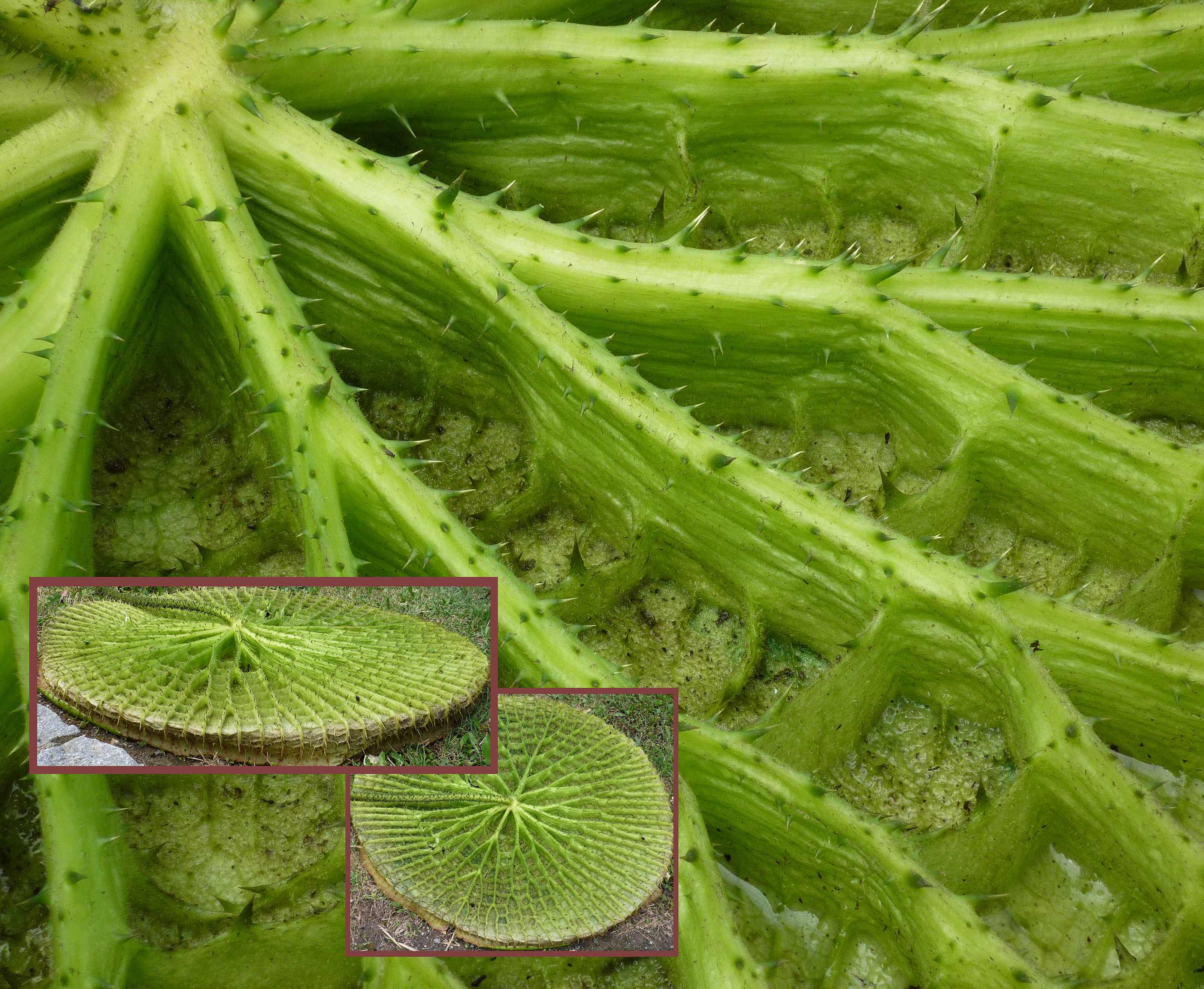 Riesenseerose im Ökologisch-Botanischen Garten der Universität Bayreuth.